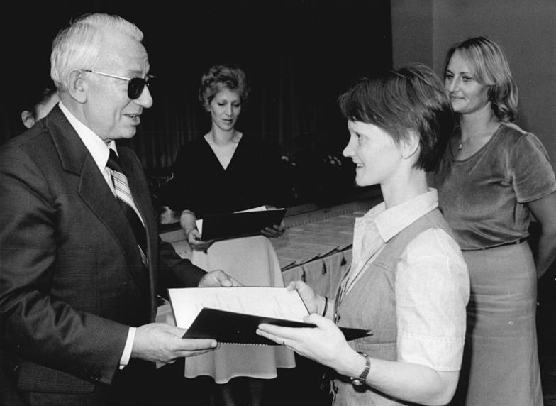 ADN-ZB-Franke-31.8.1979-tr-Berlin: Friedensratstagung - Anschließend an die Plenartagung des Friedensrates der DDR in Berlin, wurden Persönlichkeiten, die sich um die Friedensbewegung verdient gemacht haben, vom Präsidenten des Friedensrates, Prof. Dr. Günther Drefahl (l.), geehrt. Mit der Deutschen Friedensmedaille wurde Karin Büttner-Janz, Mitglied des Präsidiums des DTSB der DDR, ausgezeichnet.